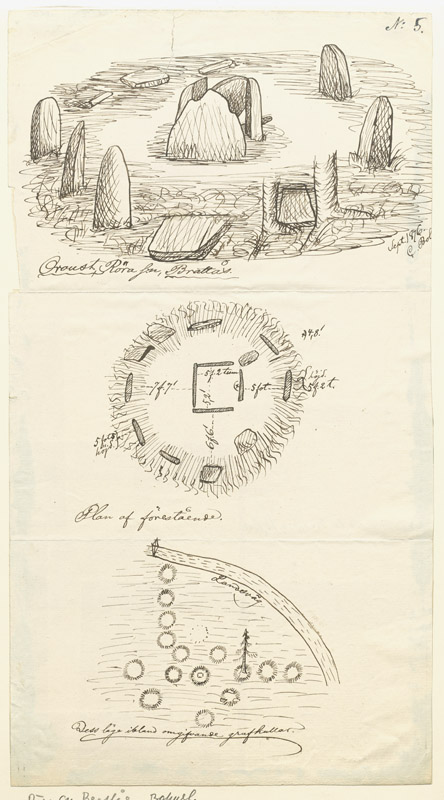 Raä-nr: Röra 39:1. Dös i hög bl a. Tuschteckning av C Bolm 1876. Motiv: Röra 39:1 Kategori: Teckning, Stenkammargrav Raä-nr: Röra 39:1. Dös i hög bl a. Tuschteckning av C Bolm 1876. Röra 39:1.